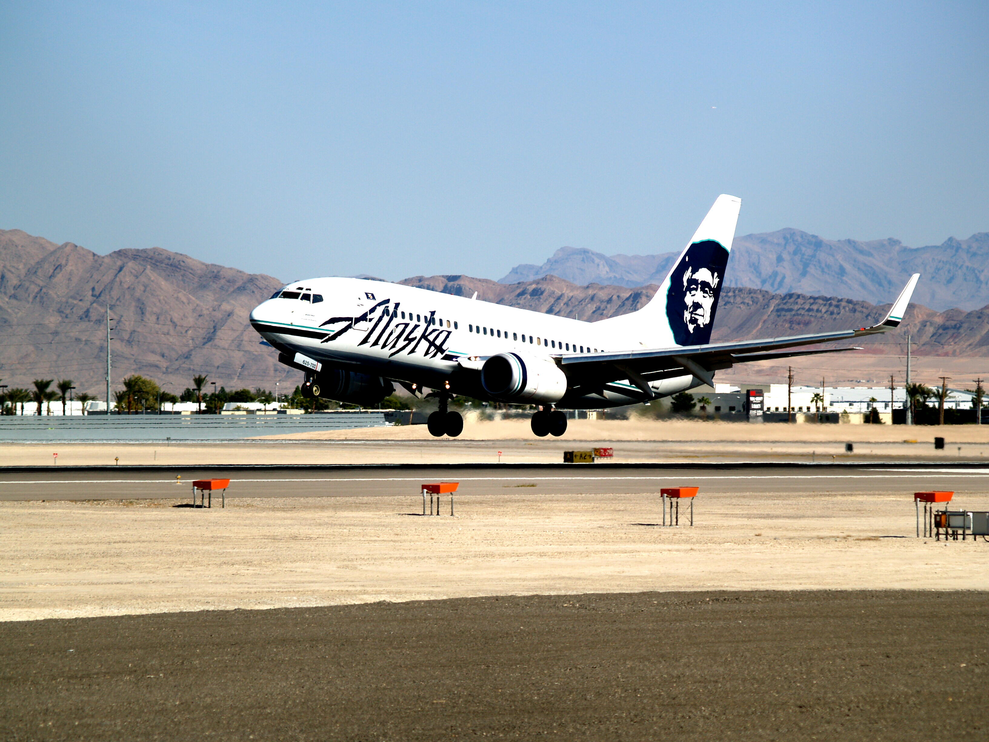 Alaska Airlines Boeing 737-790 N625AS